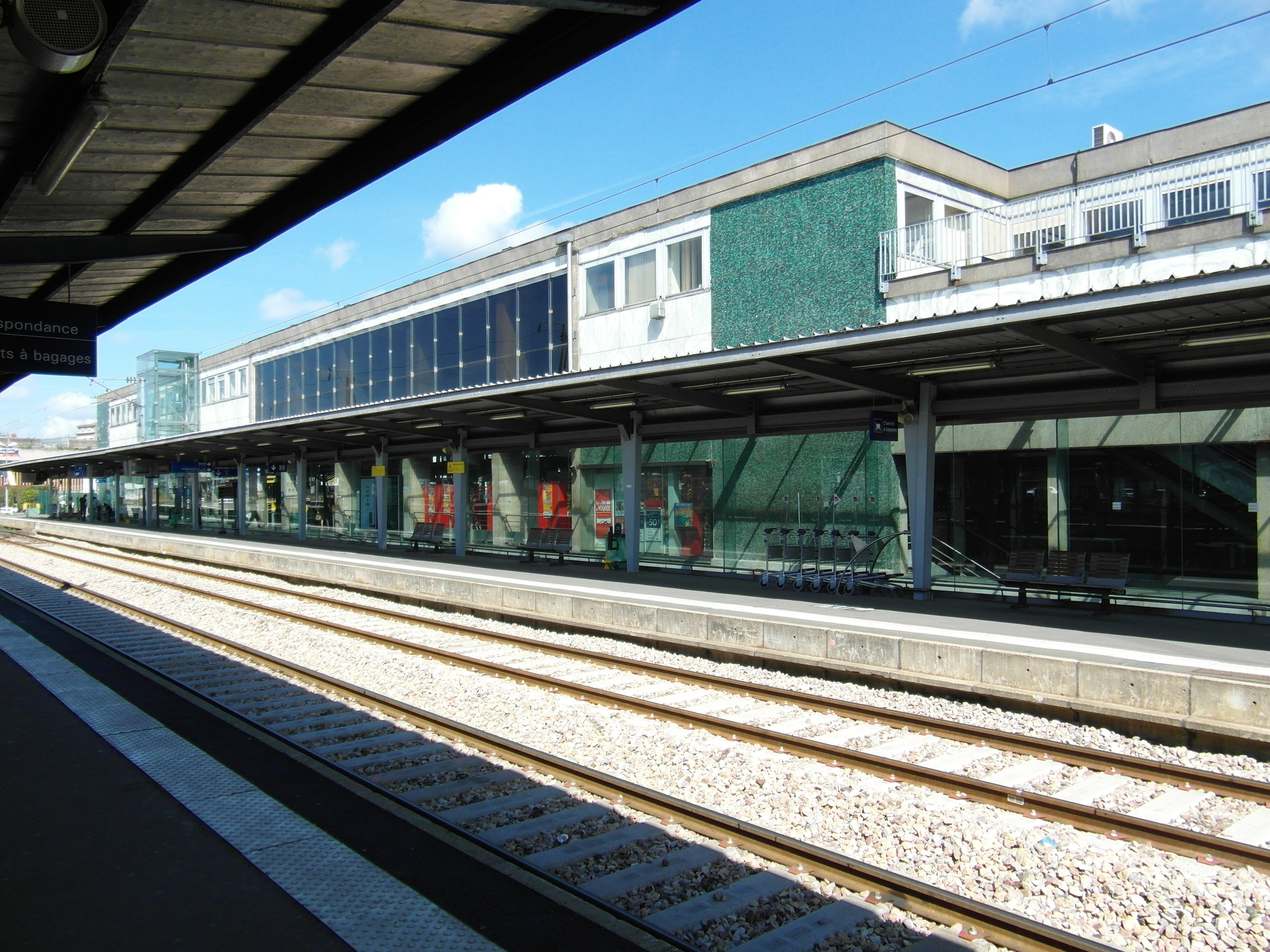 Nantes - Gare